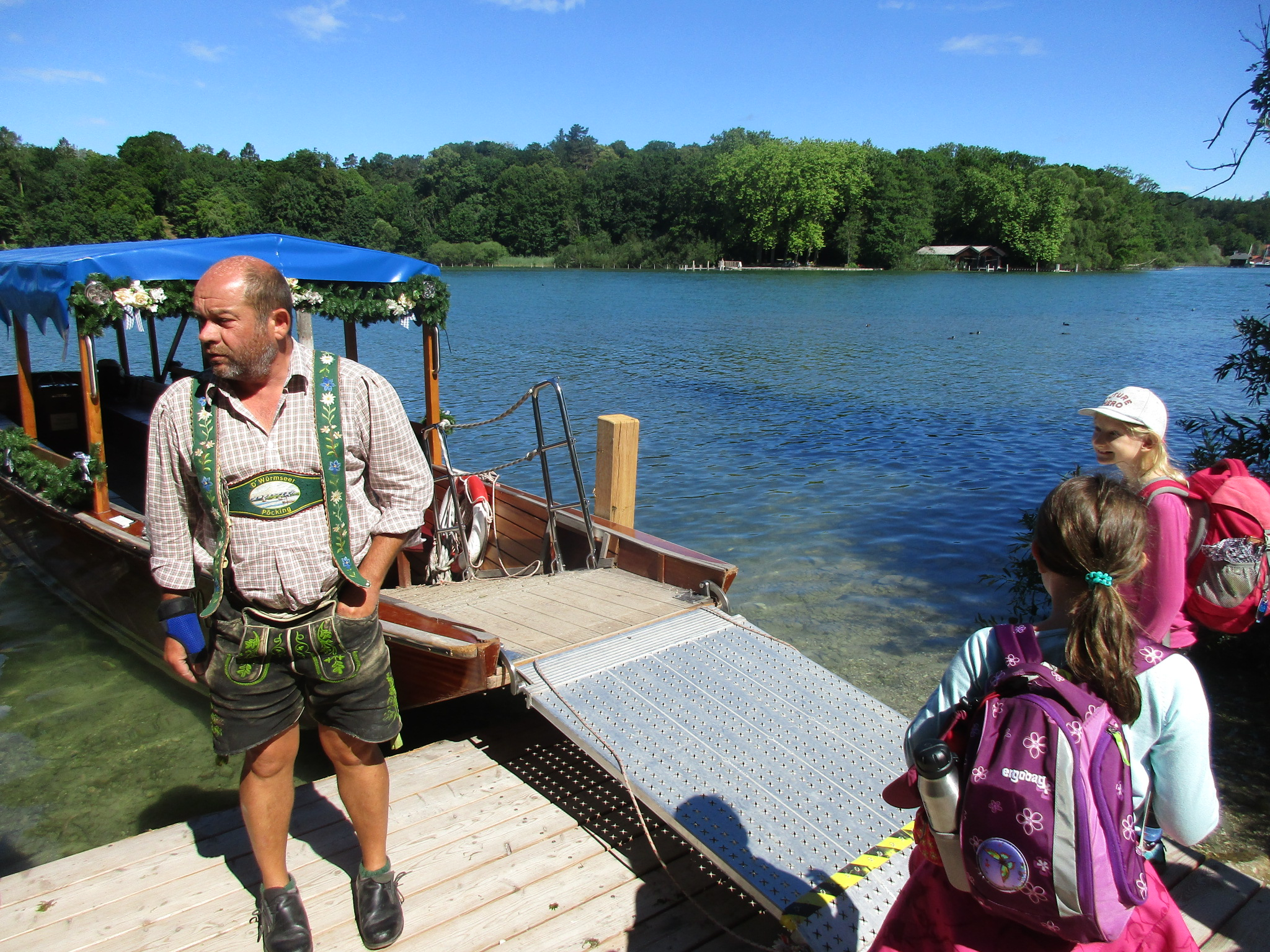 Ile aux Roses